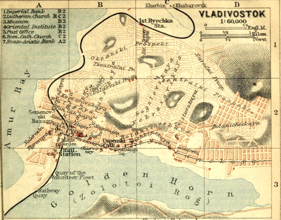 map of Vladivostok